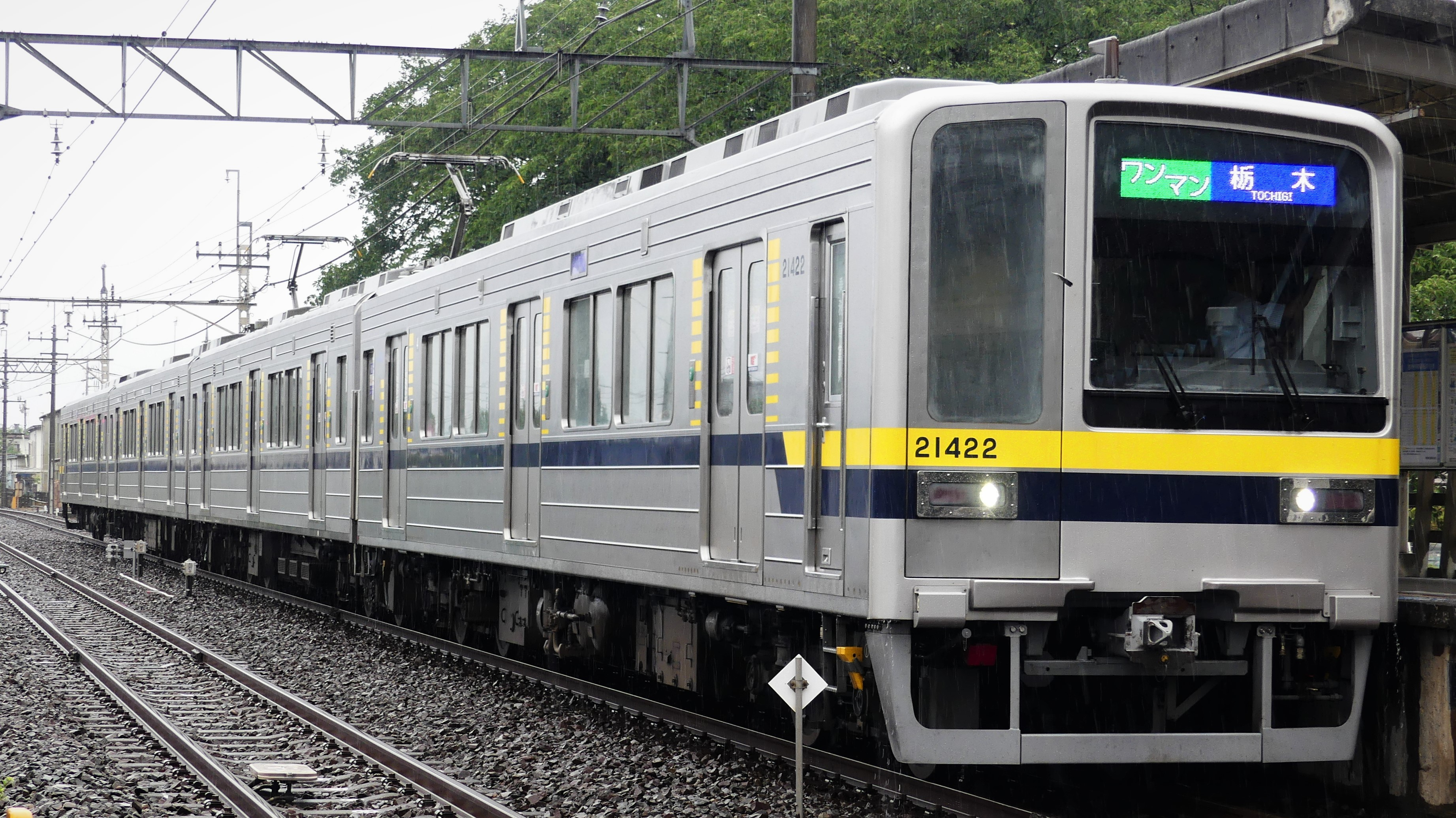 東武宇都宮線で使用される東武20400型（国谷駅撮影）